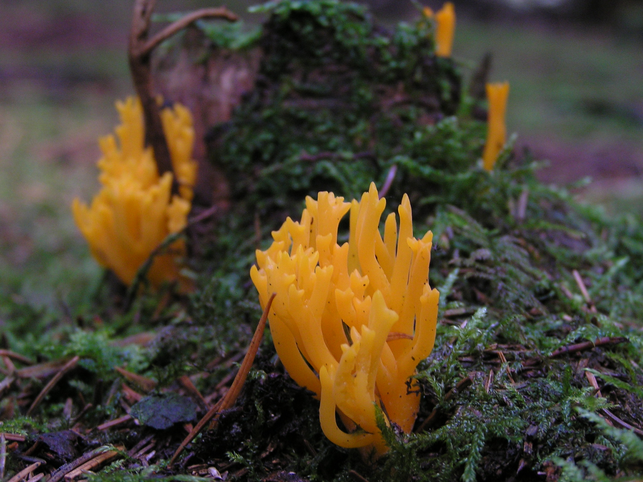 Calocera viscosa